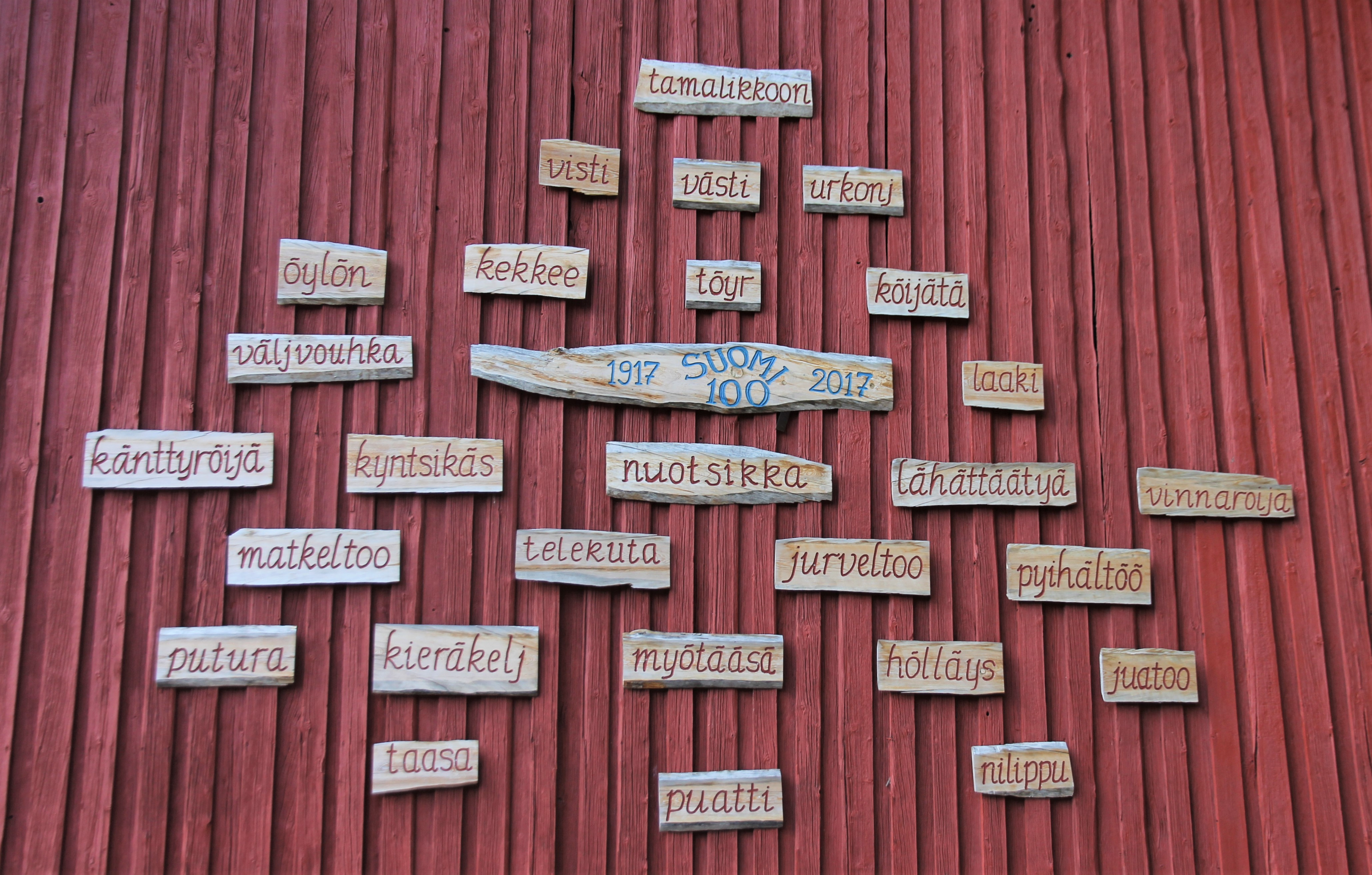 Tuusniemen kotiseutumuseo seinässä esitellään Tuusniemellä tavattavia murresanoja. Sanojen selitykset voi käydä katsomassa museon toiselta seinältä. Tuusniemen kotiseutumuseo on pohjoissavolaisen Tuusniemen kunnan kirkonkylällä, Tuusniemen kirkon ja kunnantalon naapurina sijaitseva paikallismuseo. Museon osoite on Keskitie 19, Tuusniemi.